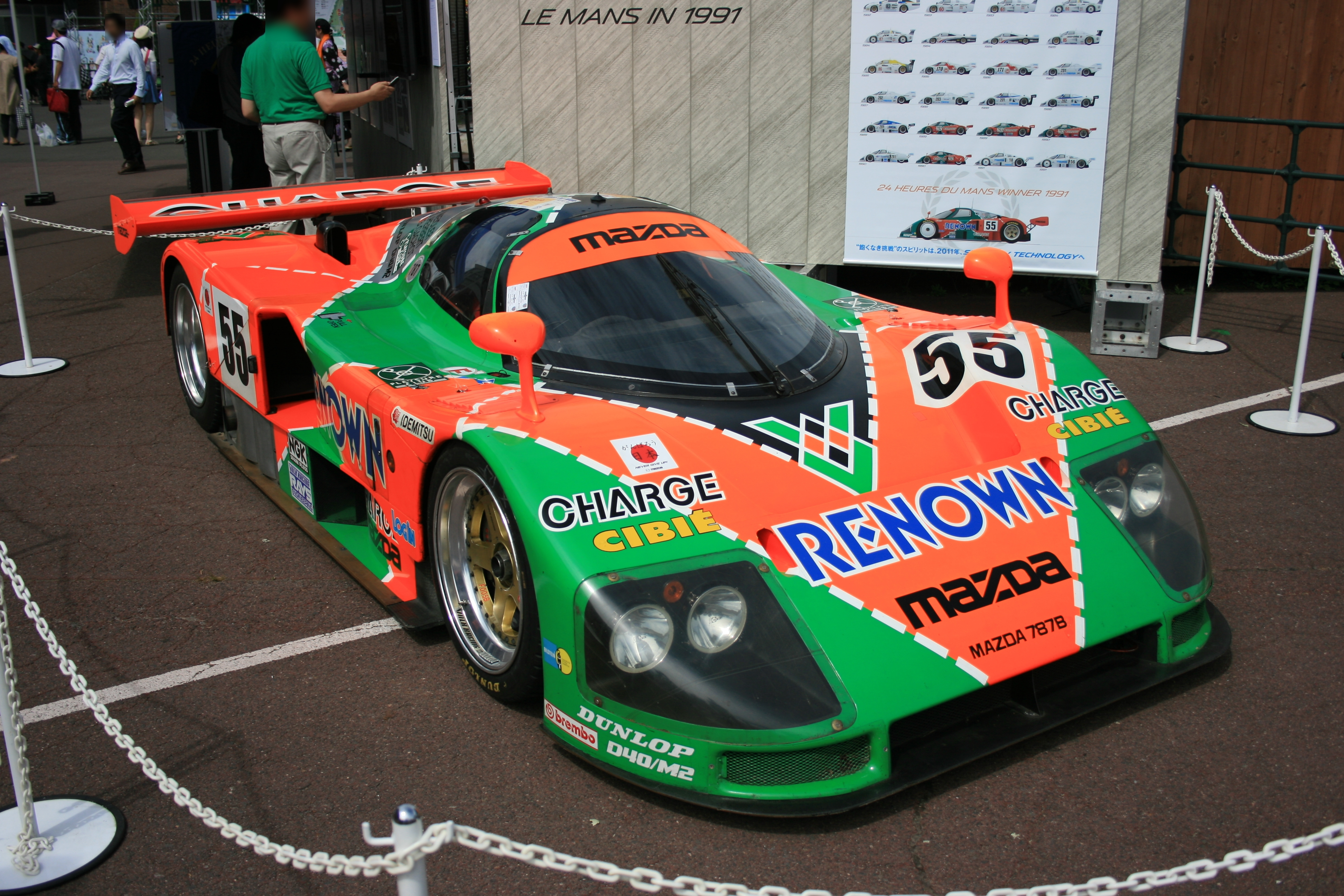 Mazda 787B in Odaiba